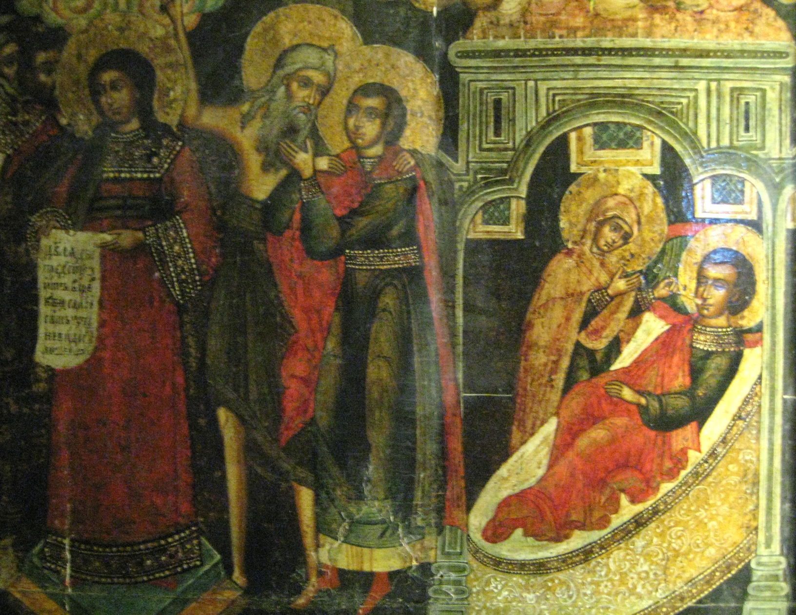 "Покров Пресвятой Богородицы". 1642. Икона с изображением сцены из жития св. Романа Сладкопевца - автора песнопений в честь Богородицы. Святой представлены в нижней части иконы в алом одеянии со свитком. Справа от него - свидетель явления Божьей матери во Влахернской церкви, св. Андрей Юродивый и его ученик Епифаний. В правой части иконы - сцена вручения Богоматерью свитка спящему св. Роману. Иконописец Роман Романов сын. Написана для: уезд Н(?)икулинский стан в село Щеглянково, церковь Покрова